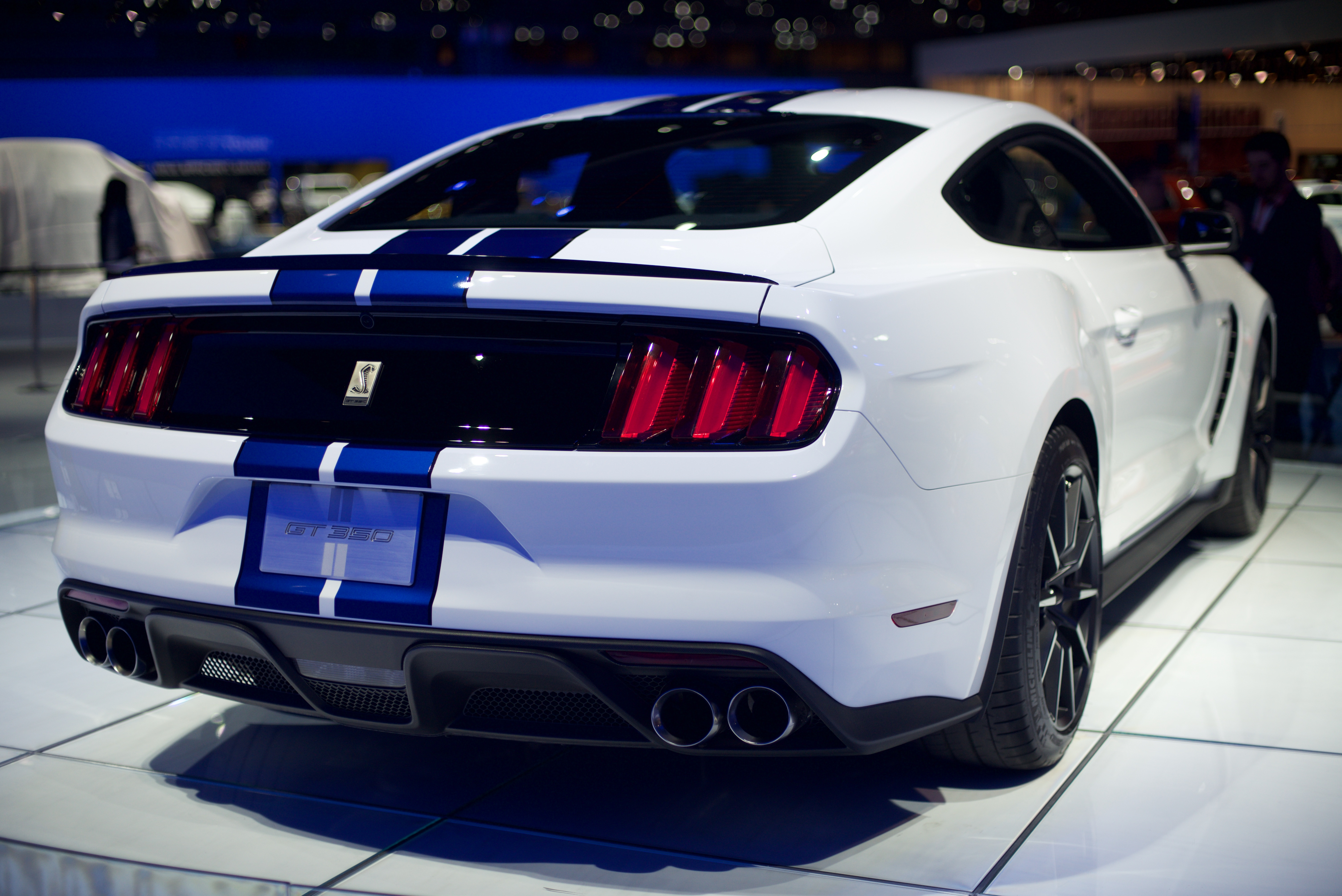 SLY_5654